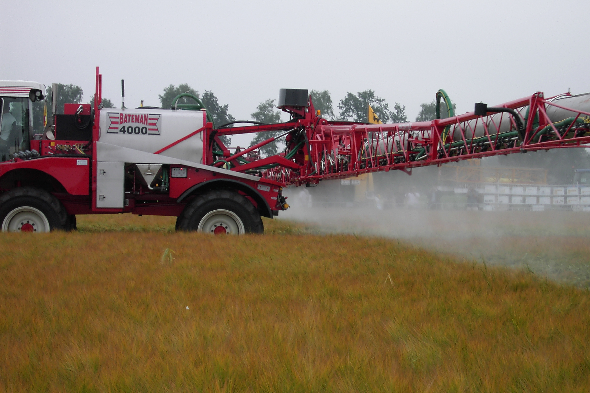 Selbstfahrspritze Bateman 4000 mit aktiver Luftunterstützung in einem Gerstebestand, Demodag Vreedepeel, Niederlande